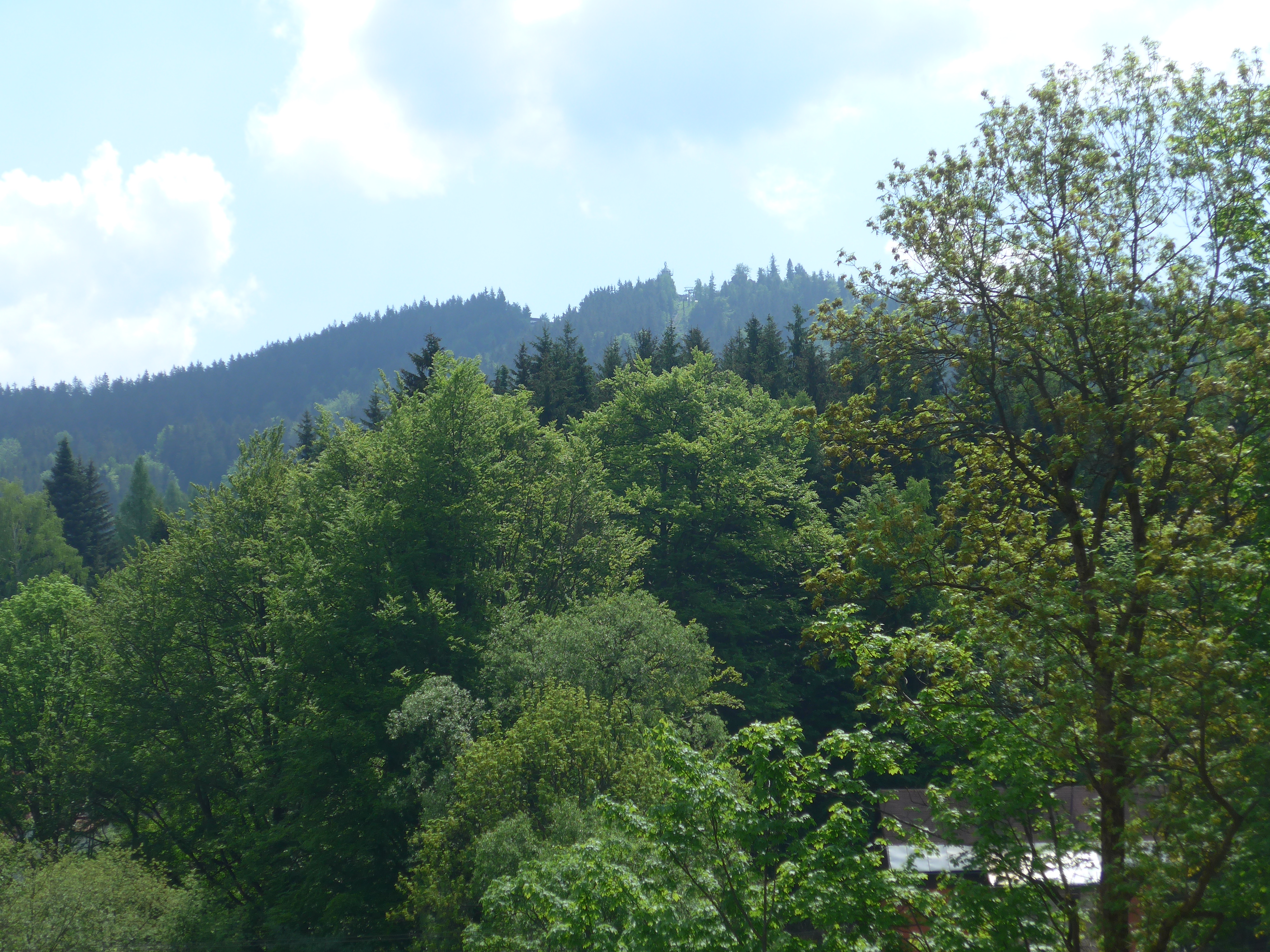 Špičák, kopec nad Tanvaldem, nadmořská výška 810 m